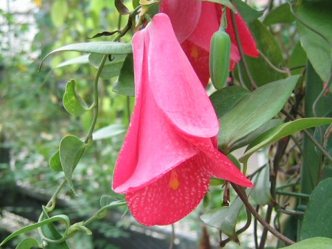 Lapageria rosea